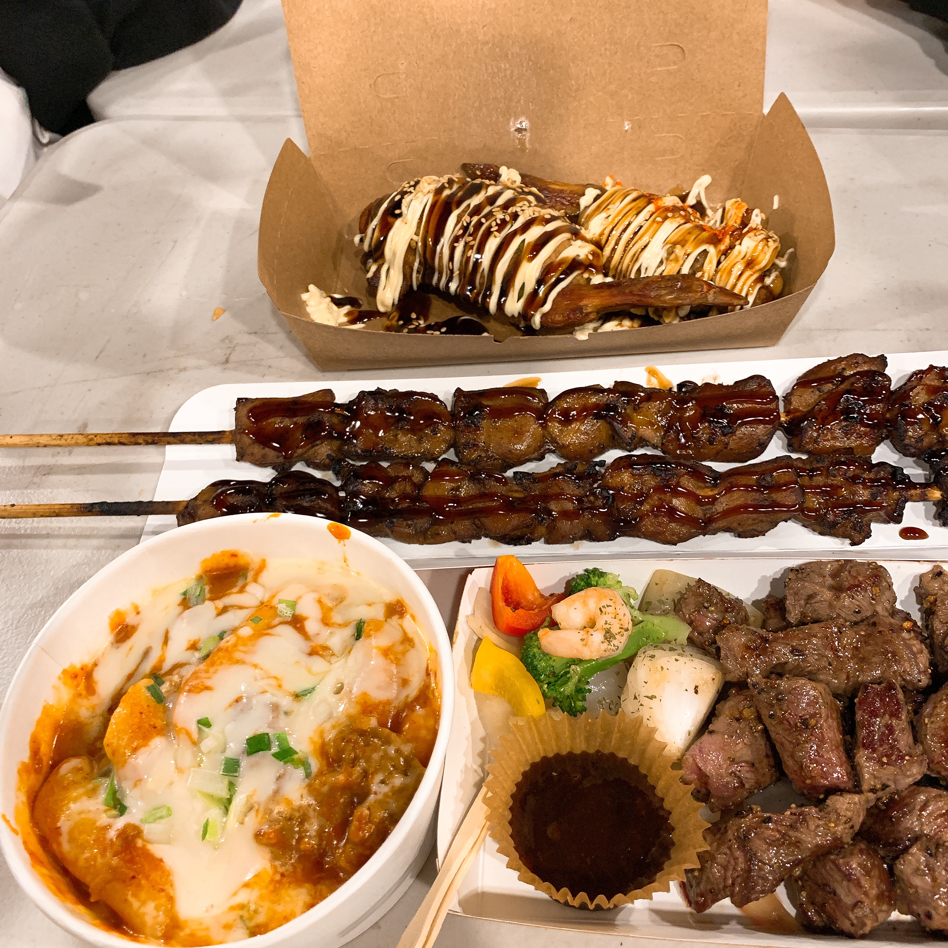 큐브스테이크, 닭고기필라프, 닭꼬치, 제육치즈떡볶이.